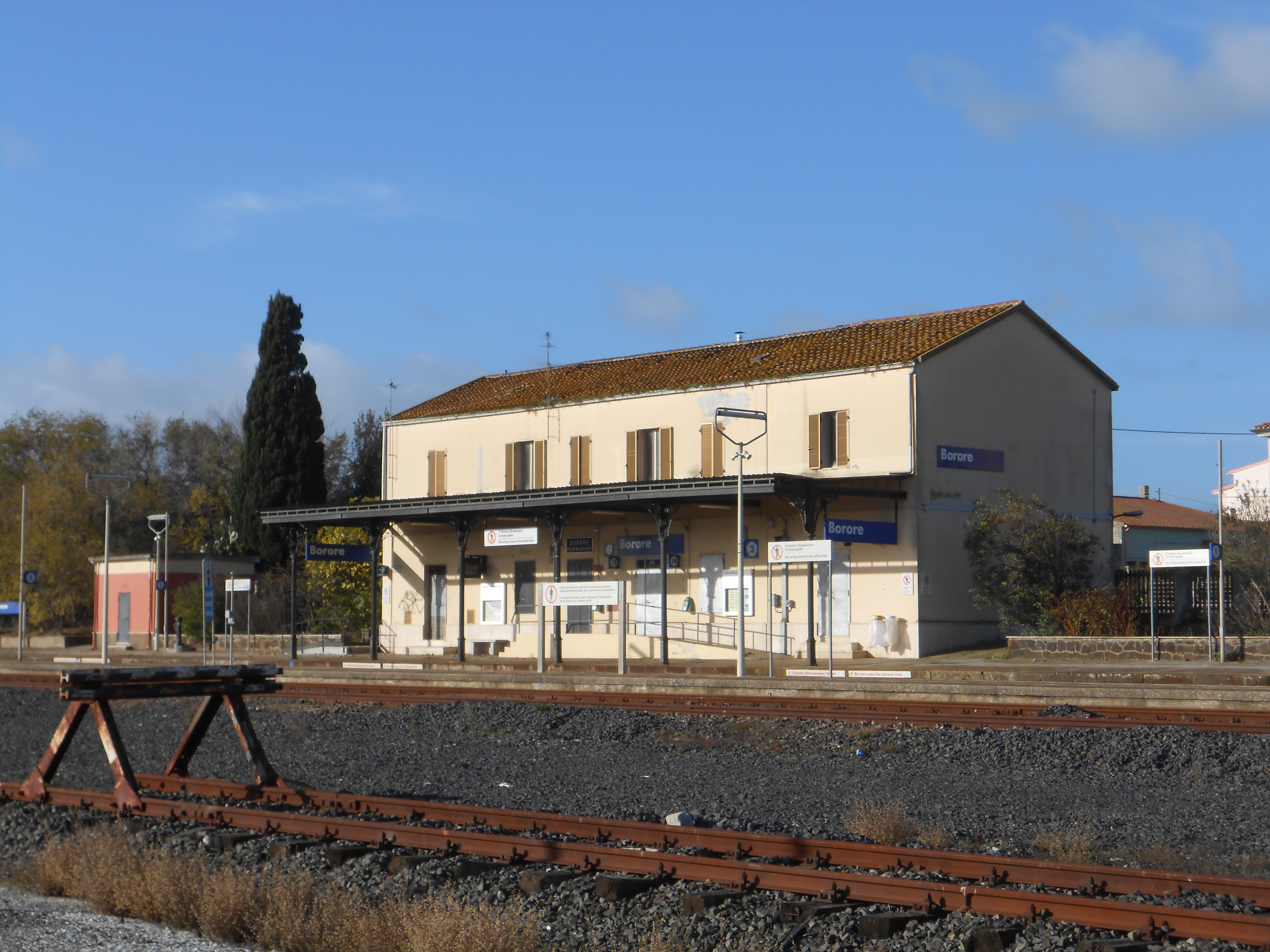 Stazione di Borore - Fabbricato viaggiatori